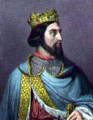 Hendrik I van Frankrijk